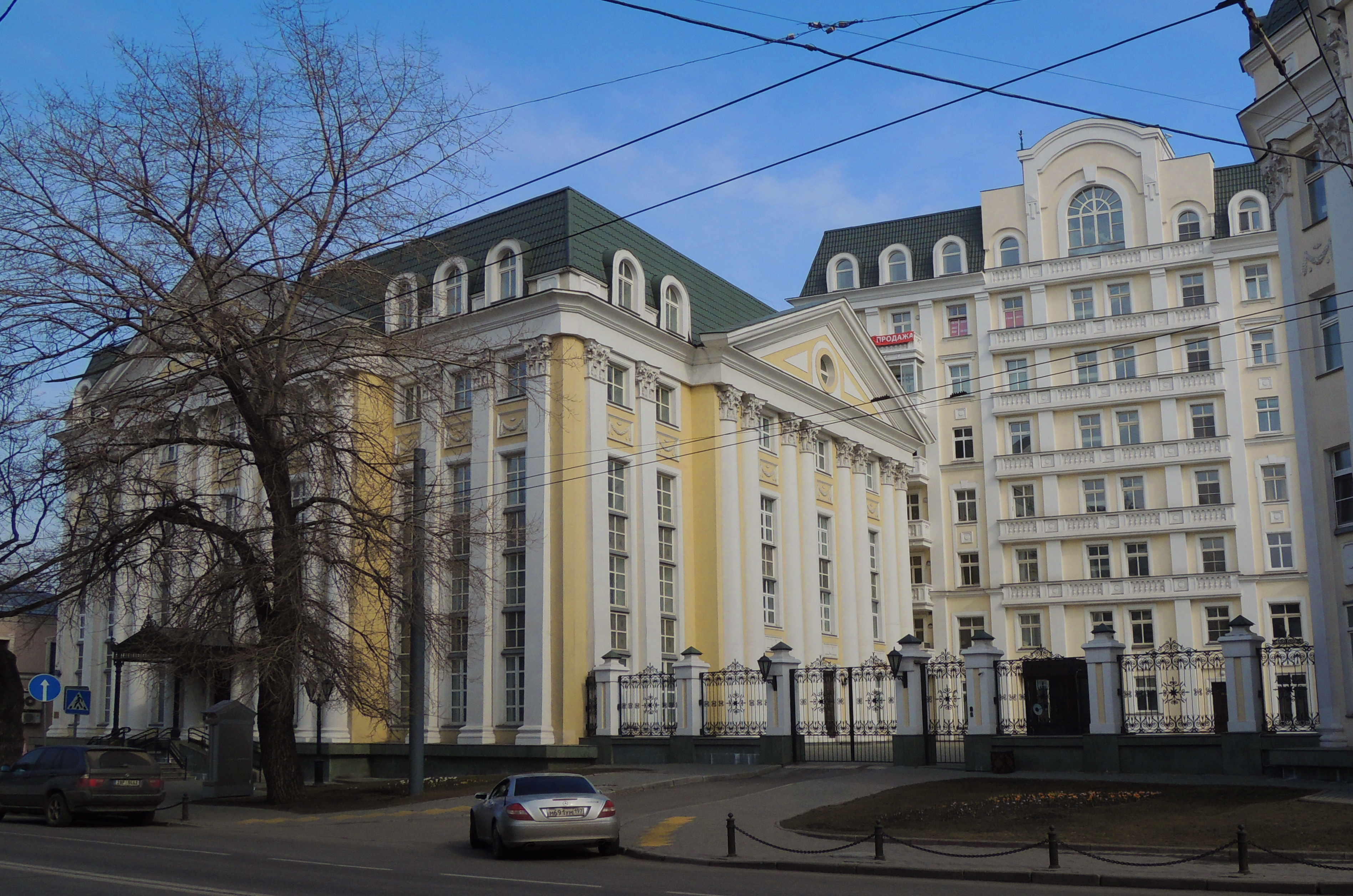 ул. Остоженка